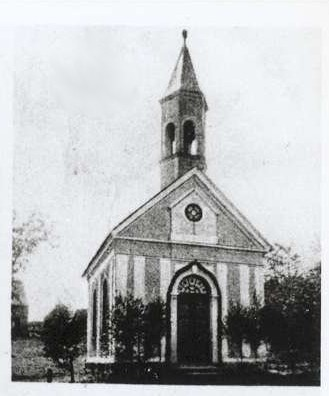 Kaple Nejsvětější Trojice v Nové Vísce u Dolní Poustevny